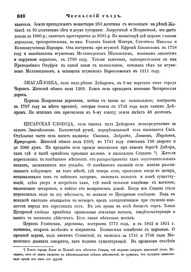 Страница 618